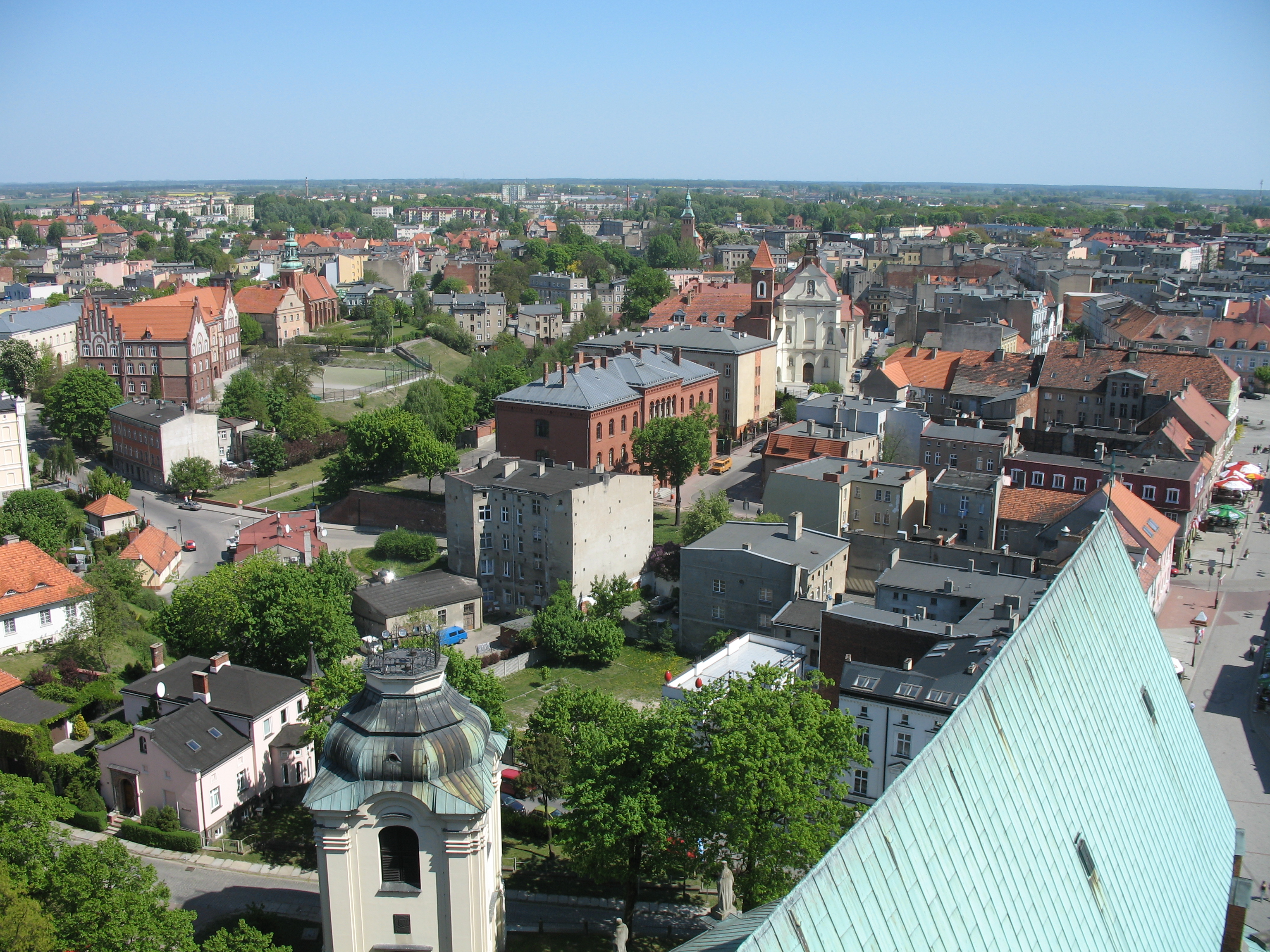 Gniezno, panorama, widok z wieży archikatedry Wniebowzięcia NMP i św. Wojciecha